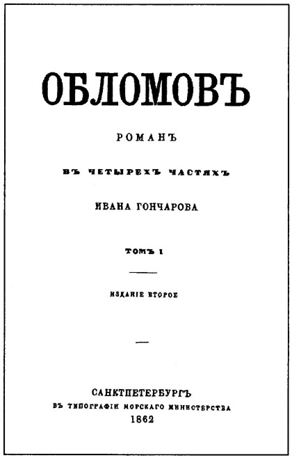 Обломов Роман Івана Гончара «Обломов». Титульный лист второго отдельного издания. 1862 г.